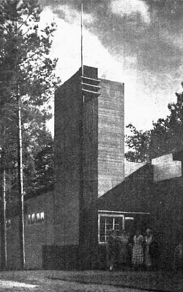 Wejście do Zakładu Leczniczego w Druskienikach nad Niemnem